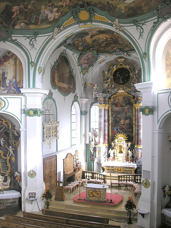 Pfarrkirche St. Vitus (Egling an der Paar, Landkreis Landsberg am Lech, Oberbayern). Blick in den Chor. Eigene Aufnahme, Okt. 2006 / Parish church St. Vitus (Egling an der Paar, Upper Bavaria, Germany). View into the choir. Own photo, Oct. 2006